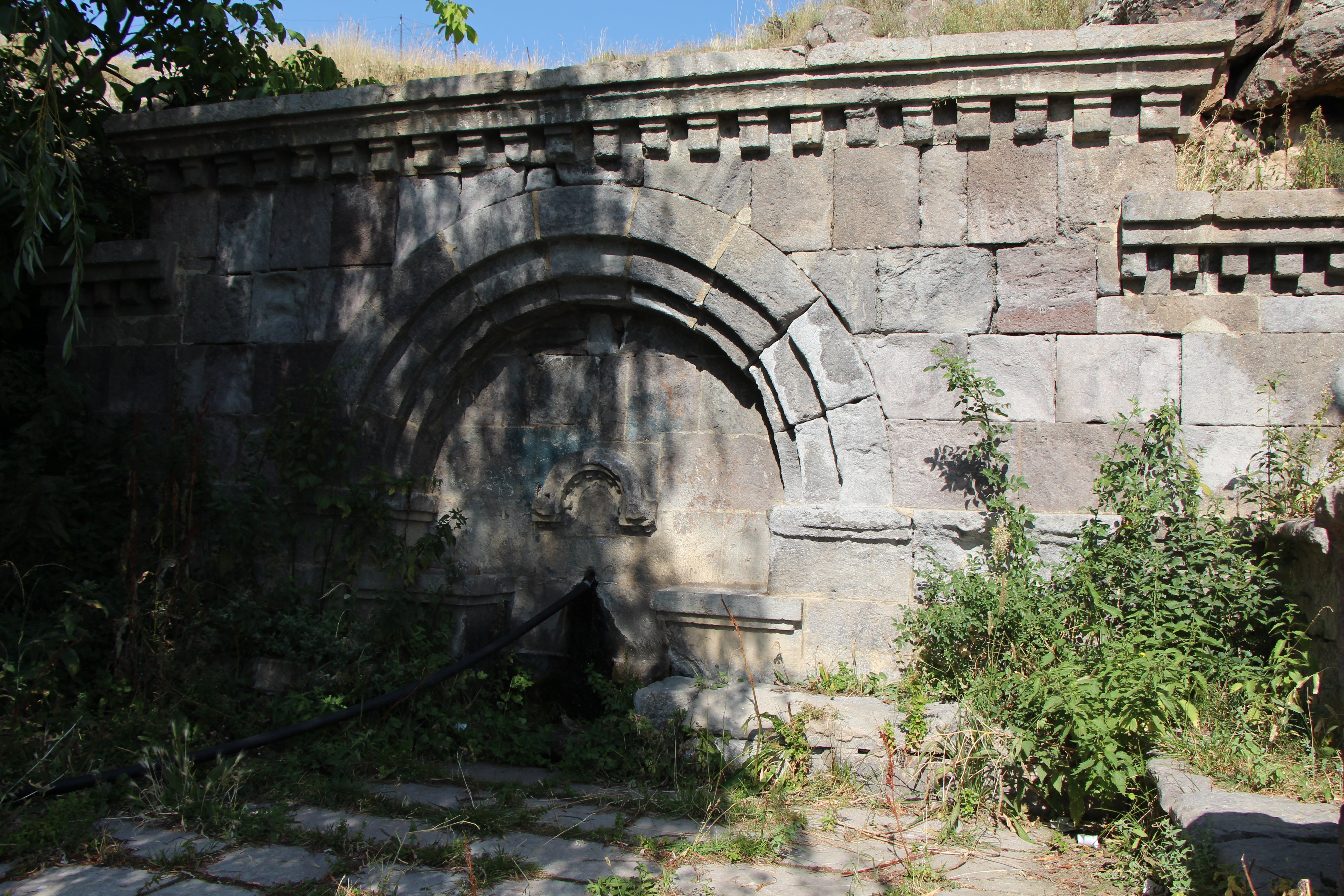 Կաթնաղբյուր, Արագածոտնի մարզ, ՀՈՒՇԱՂԲՅՈՒՐ` ԵՐԿՐՈՐԴ ԱՇԽԱՐՀԱՄԱՐՏՈՒՄ ԶՈՀՎԱԾՆԵՐԻՆ 1946 թ. հս-աե մասում 2.57/7 57/7